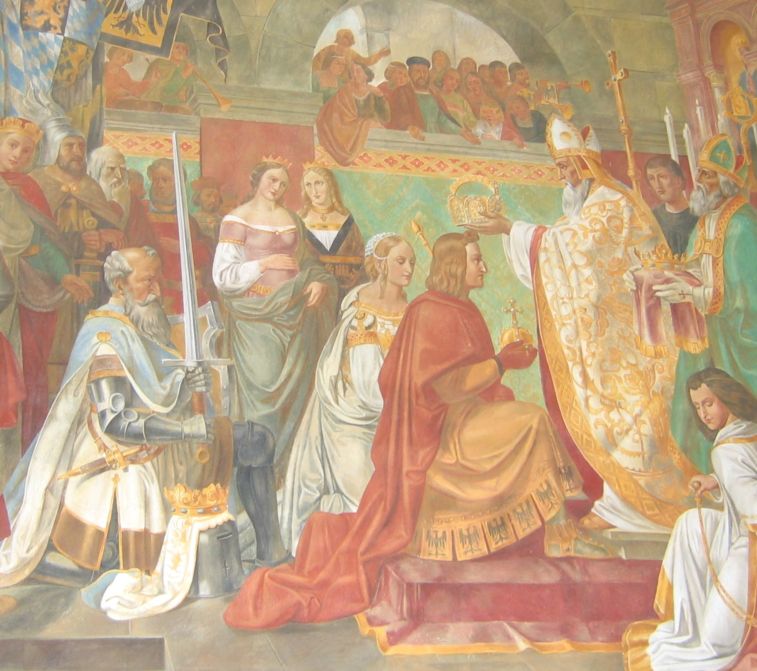 Wandgemälde im Münchener Hofgarten mit Szenen aus der bayerischen Geschichte. „Ludwig der Bayer wird mit seiner Gemahlin Margarethe in Rom zum Kaiser gekrönt, und zwar von den Bischöfen von Castello und Alexia, da Papst Johann XXII. ihn nicht anerkennen wollte (1328)“ von Hermann Stilke.